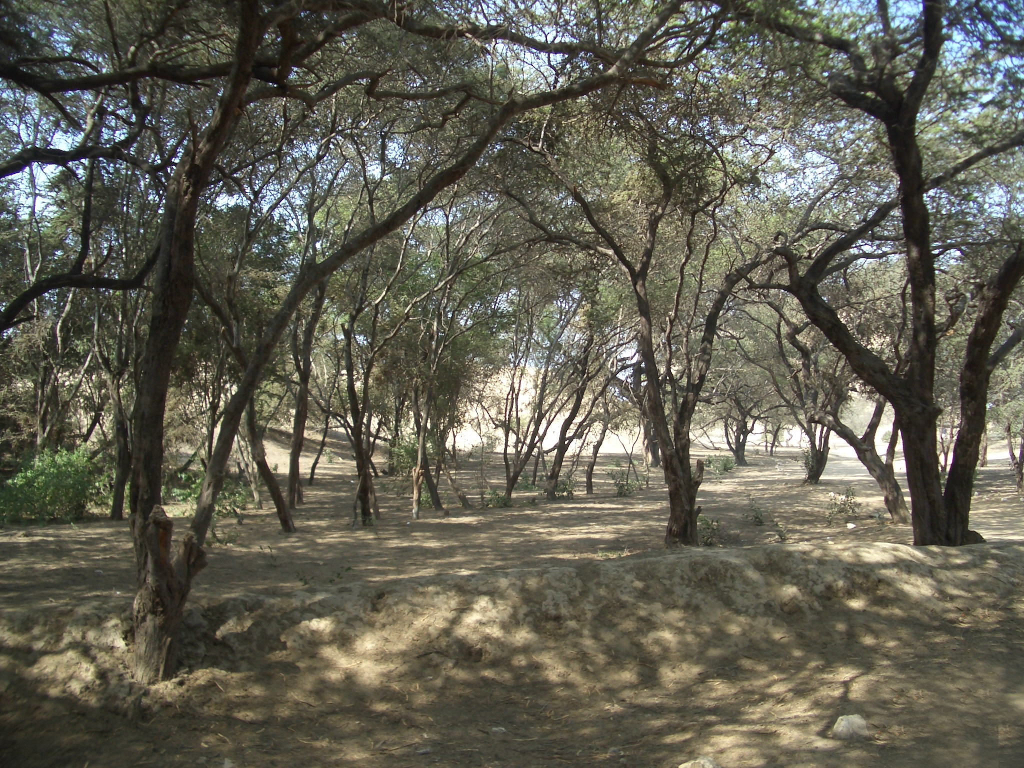 Bosque Seco (Trockenwald) bei Túcume